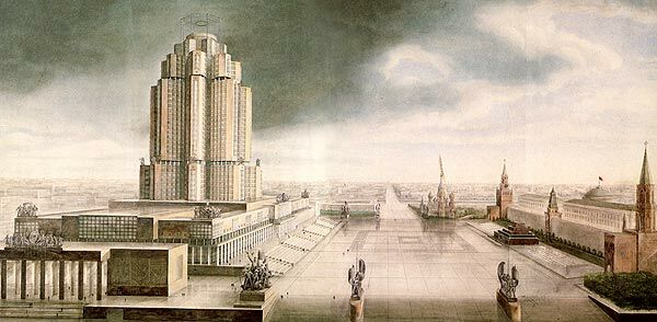 Конкурс проектов здания Народного Комиссариата тяжелой промышленности, 1934 год.